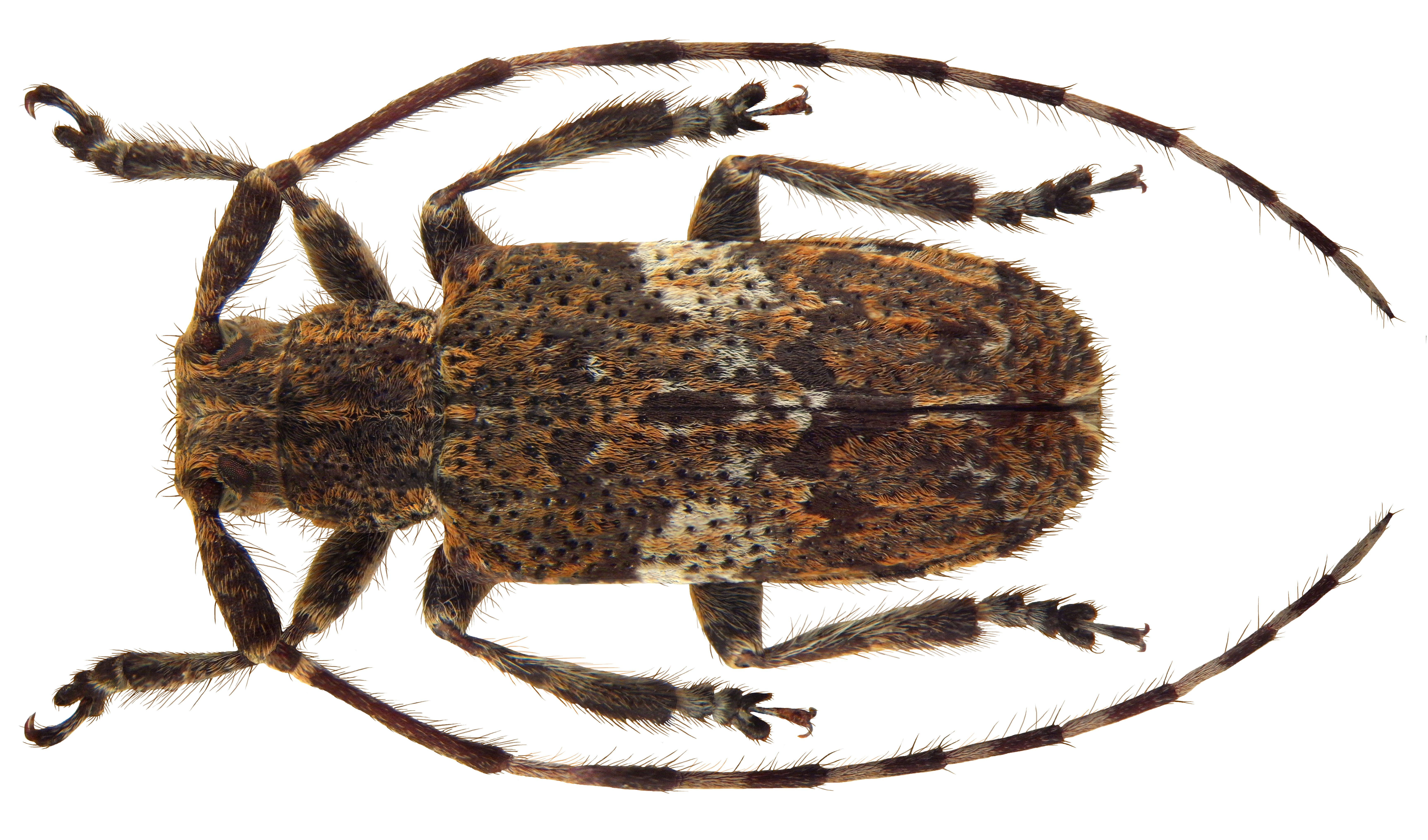 Familie: Cerambycidae Groesse: 9-15 mm Verbreitung: Europa Ökologie: Entwicklung in Laubholz Fundort: Germania, Thüringen, Kelbra, Rothenburg, Kyffhäuser leg.det. A.Weigel, 1998 Photo: U.Schmidt, 2010